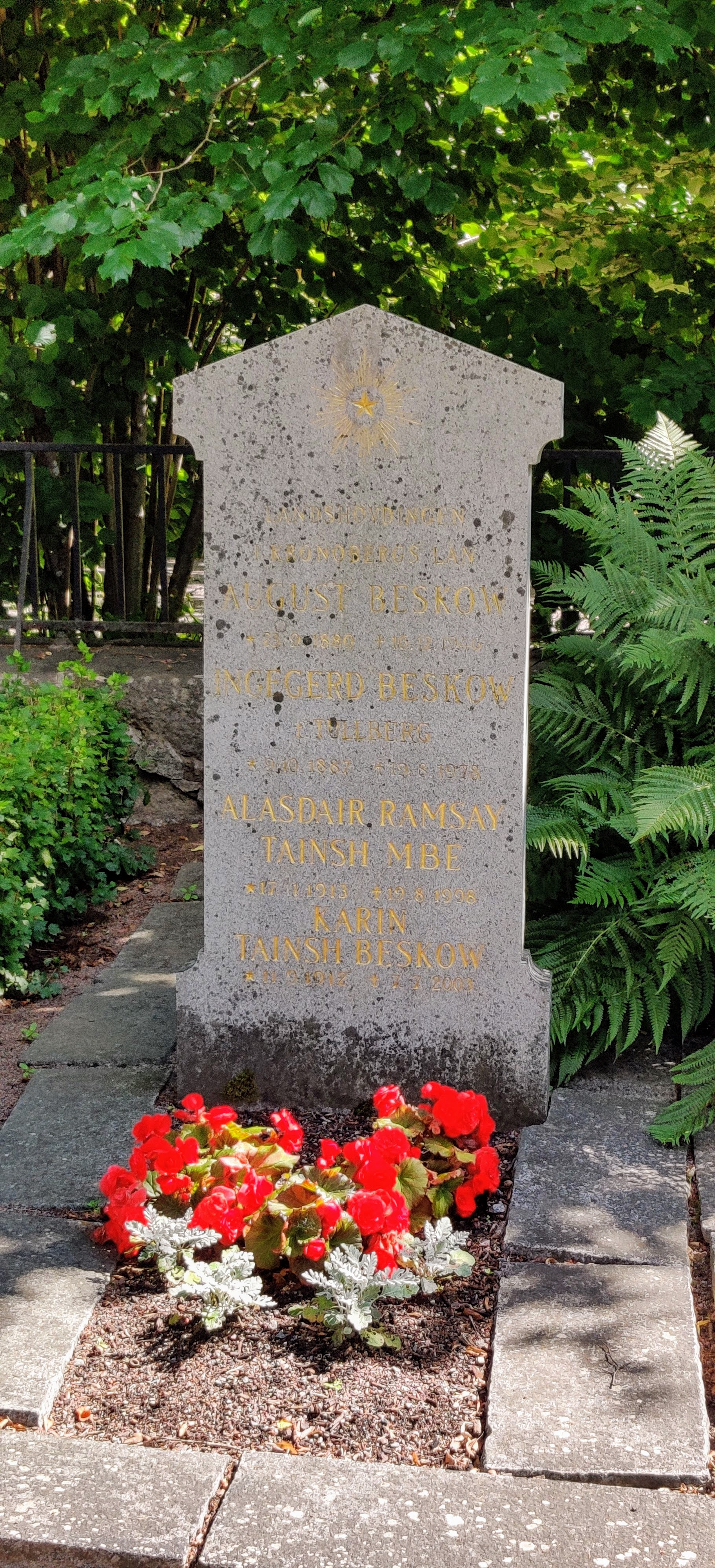 Gravvård Ingegerd Beskow, Uppsala gamla kyrkogård, augusti 2020.